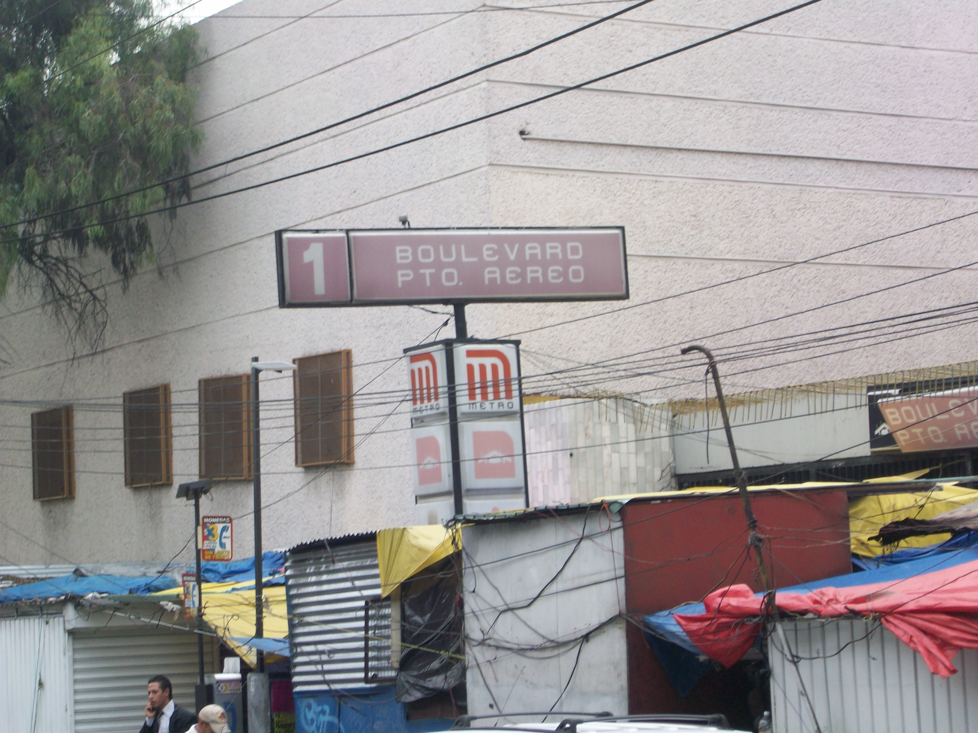 Estela estacion Boulevard Puerto Aereo